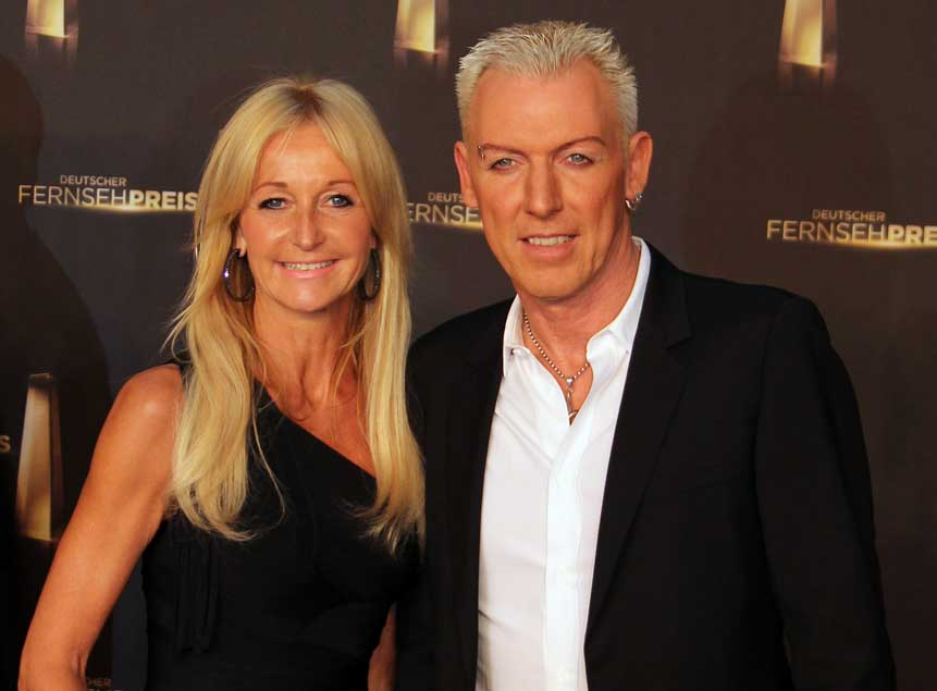 H. P. Baxxter mit Begleitung beim Deutschen Fernsehpreis 2012